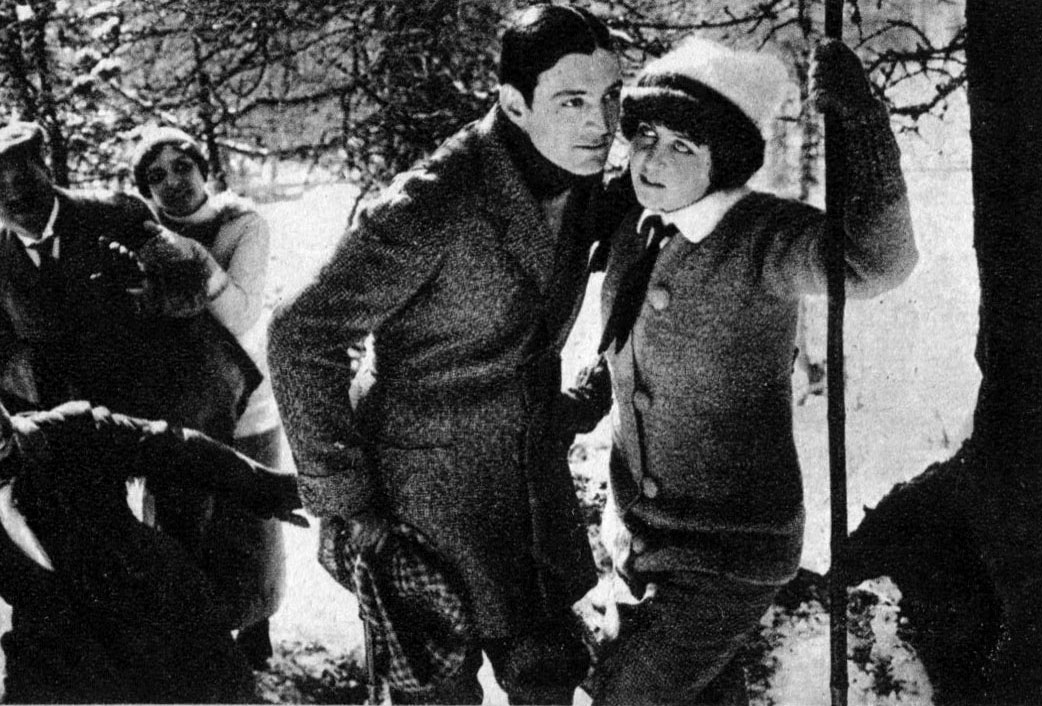 Fotogramma di Lo spettro bianco a Saint Moritz, regia di Alfredo Robert. Produz "Milano Films", 1914